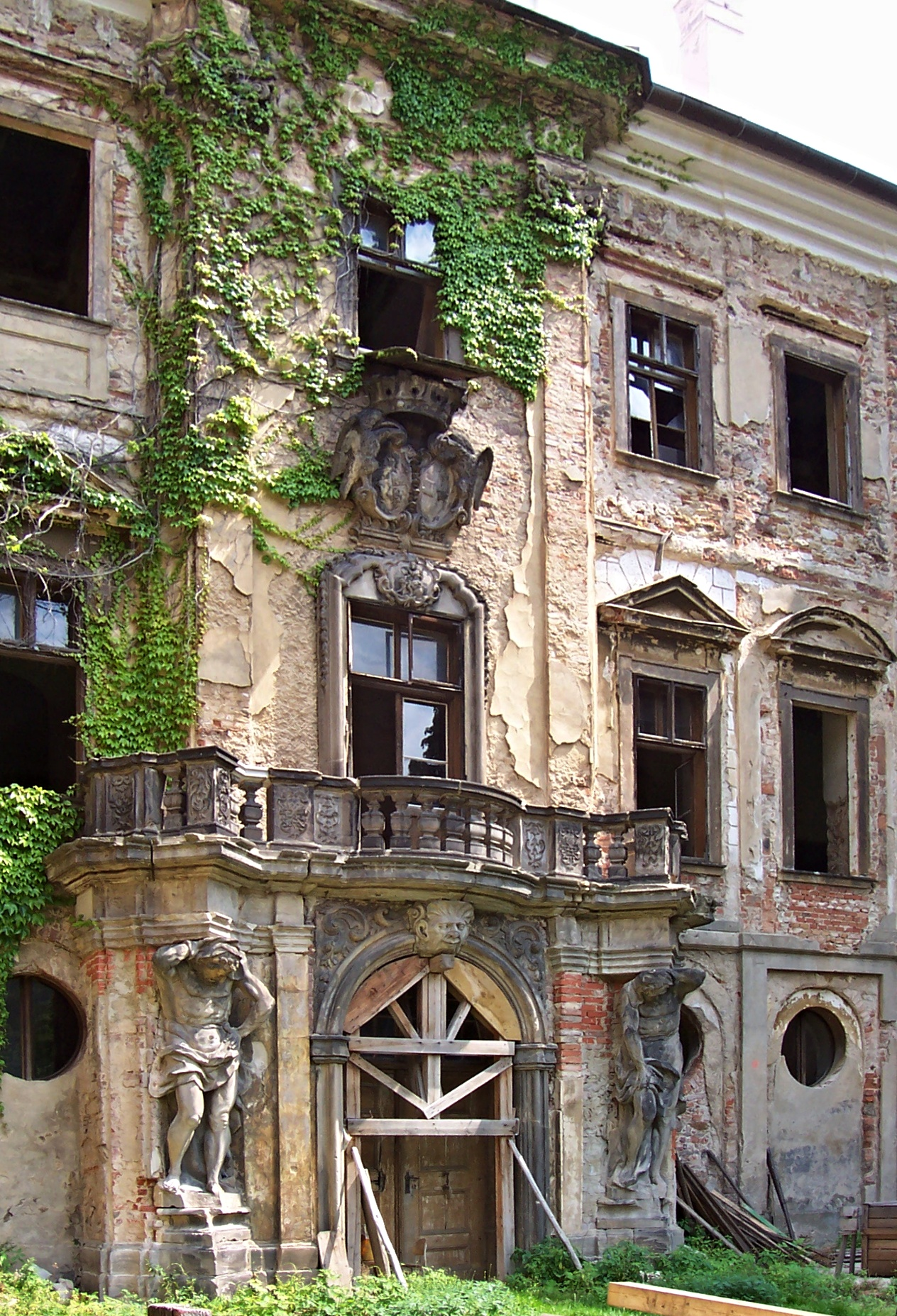 Zámek Jezeří, Jezeří čp. 1, Jezeří (Horní Jiřetín).